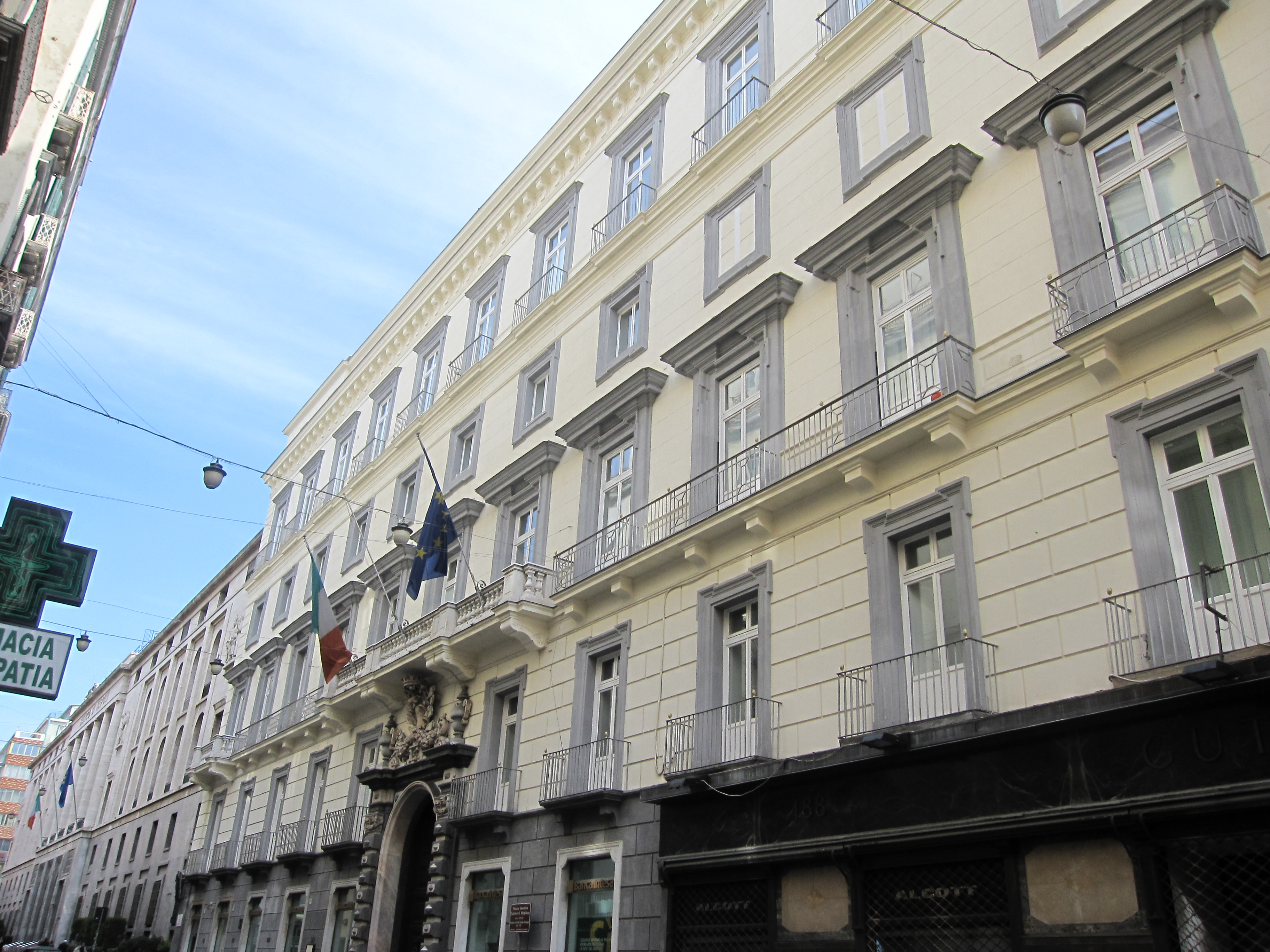 Napoli - Facciata Palazzo Colonna di Stigliano (Zevallos) in Via Toledo